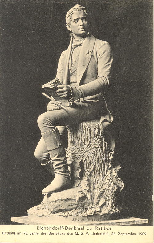 Postkarte des Eichendorff-Denkmals in Ratibor. Im Sockel signiert: J[ohannes] Boese fec[it] 1909. Enthüllt im 75. Jahre des Bestehens des M. G. V. Liedertafel, 26. September 1909.